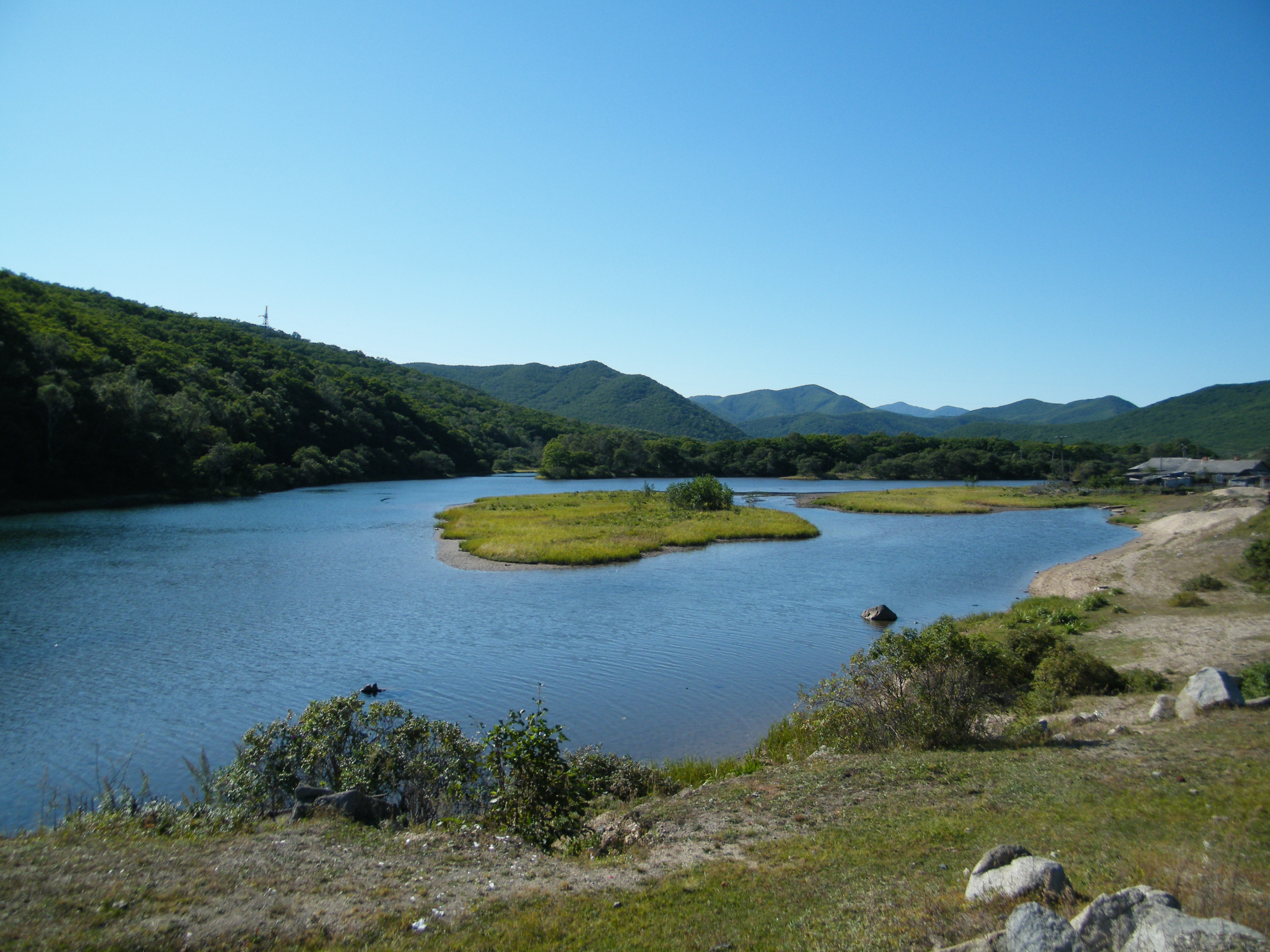 Река Мокруша, Ольгинский район, Приморье